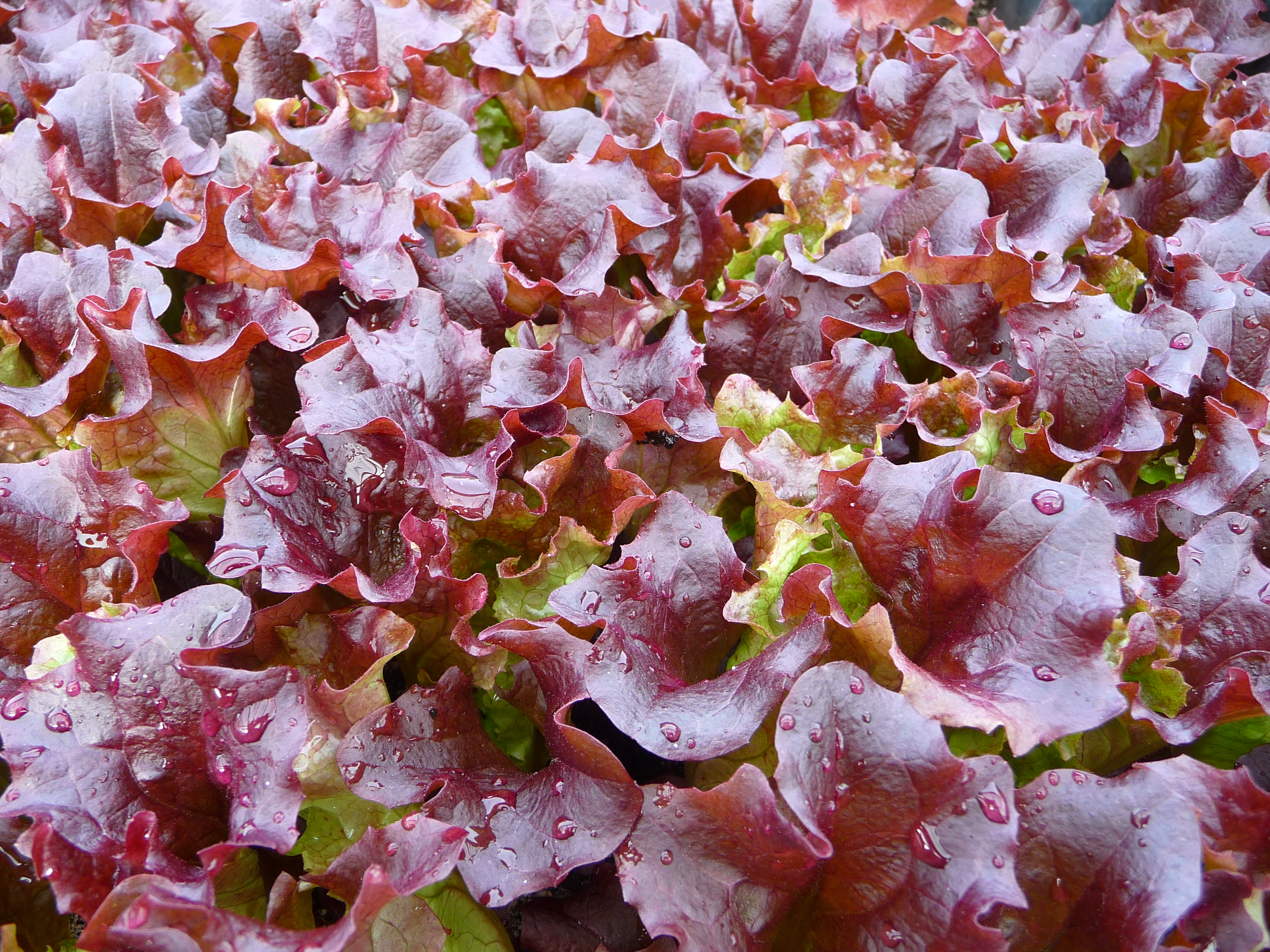 Setzlinge des Lollo rossa (Lactuca sativa var. crispa), fotografiert in Deutschland)